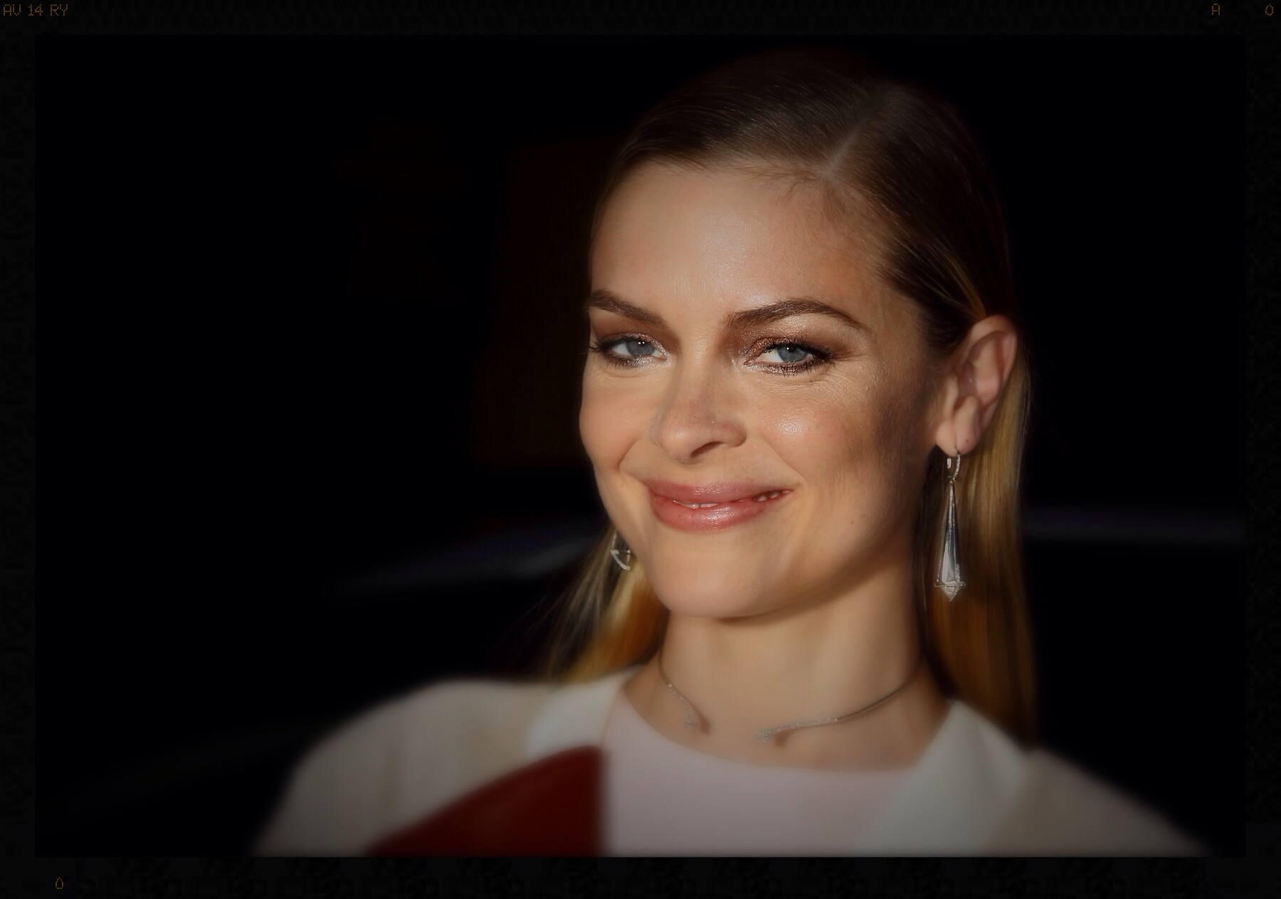 Jamie King